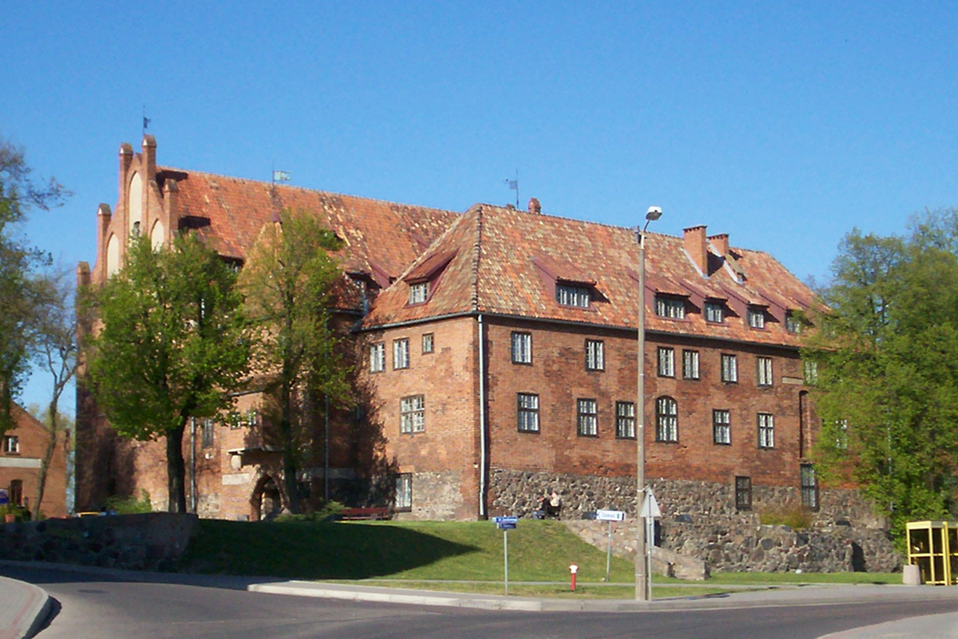 Kętrzyn, Plac Zamkowy 1 - zamek krzyżacki, XIV, XX w.